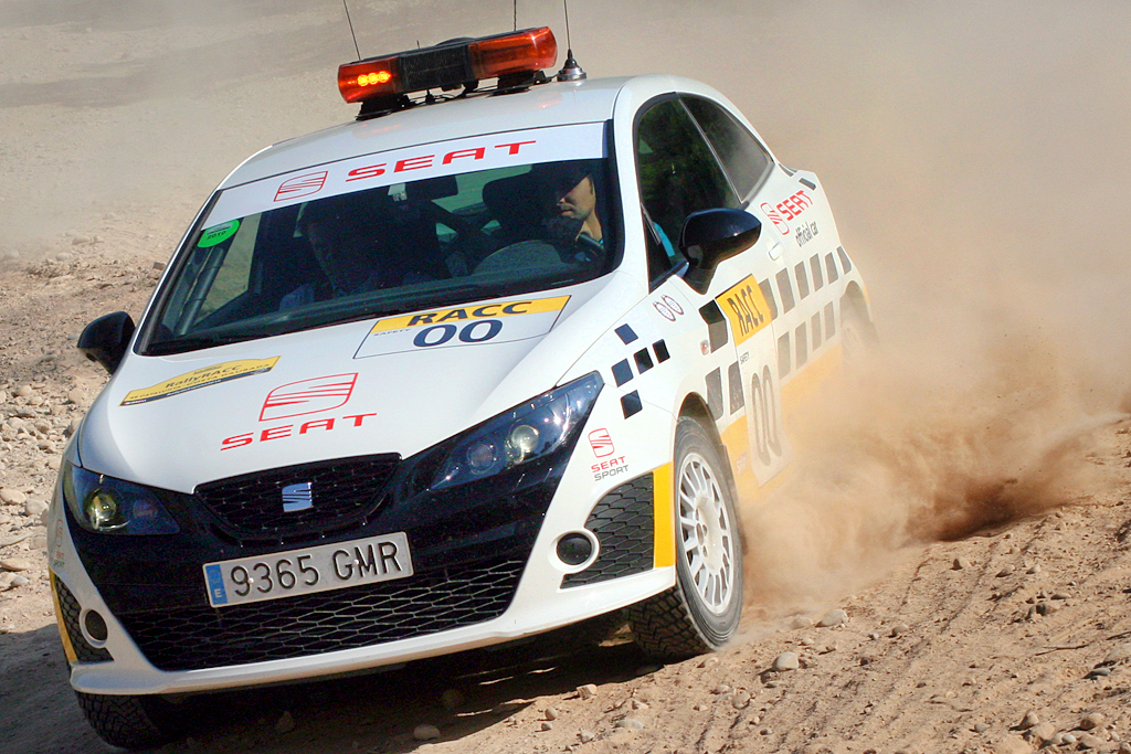 Ibiza Bocanegra Doble Cero Catalunya 2010